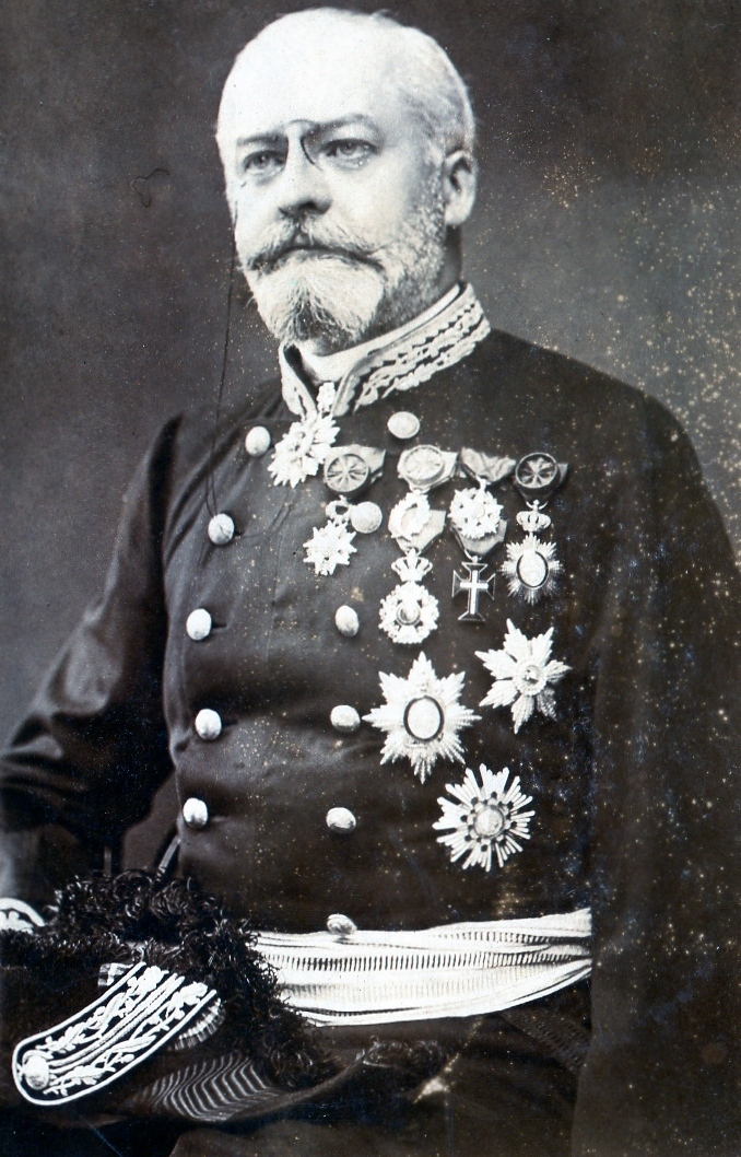 Gabriel Bouffet en grande tenue de conseiller d'Etat